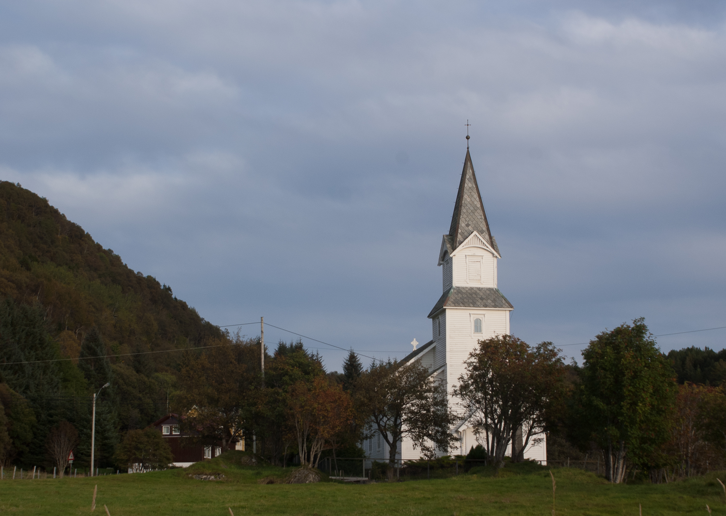 Gursken kirke, langkirke fra 1919. Arkitekt Eduard Carlén